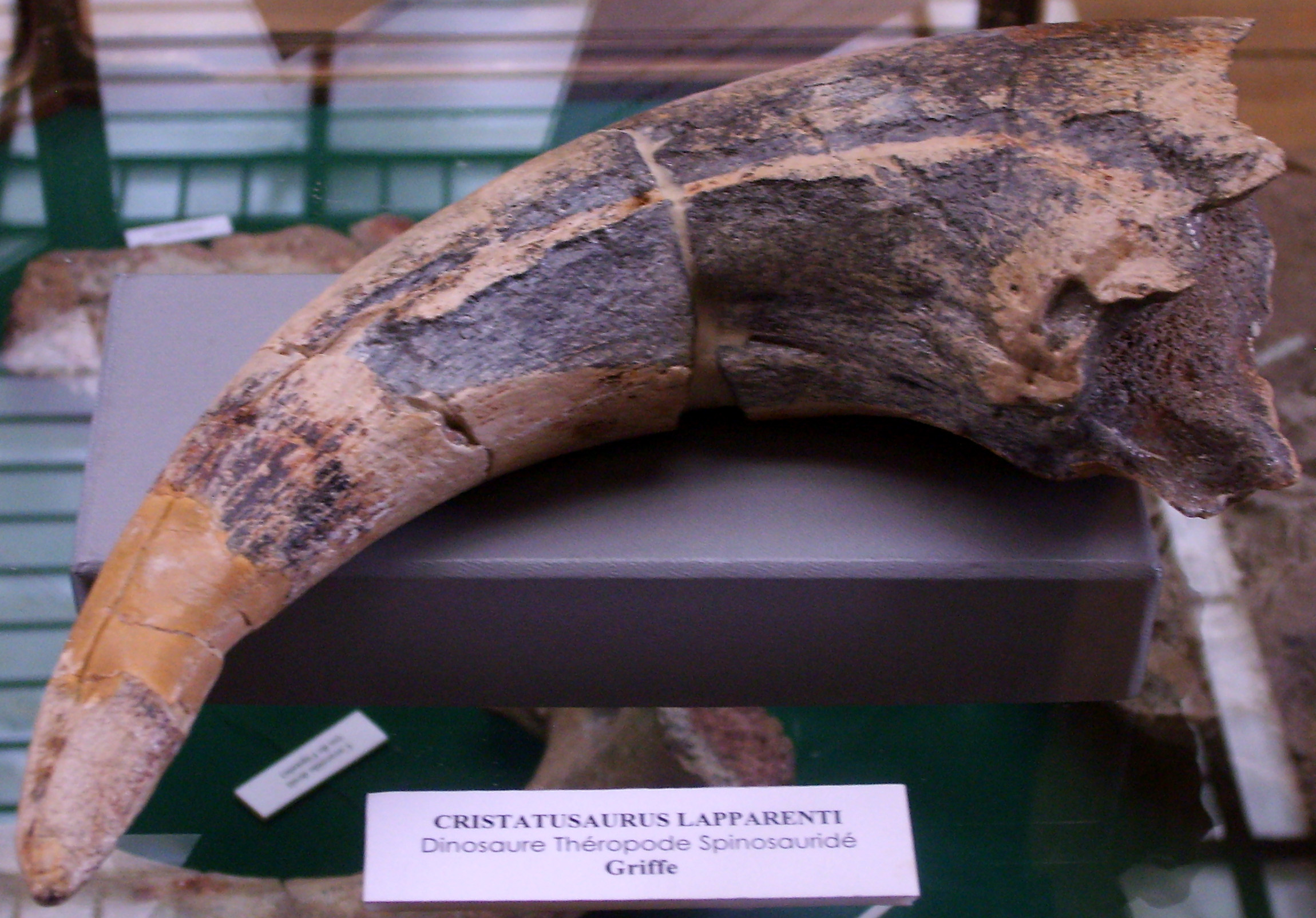 Cristatusaurus lapparenti claw fossil, Muséum national d'Histoire naturelle, Paris.